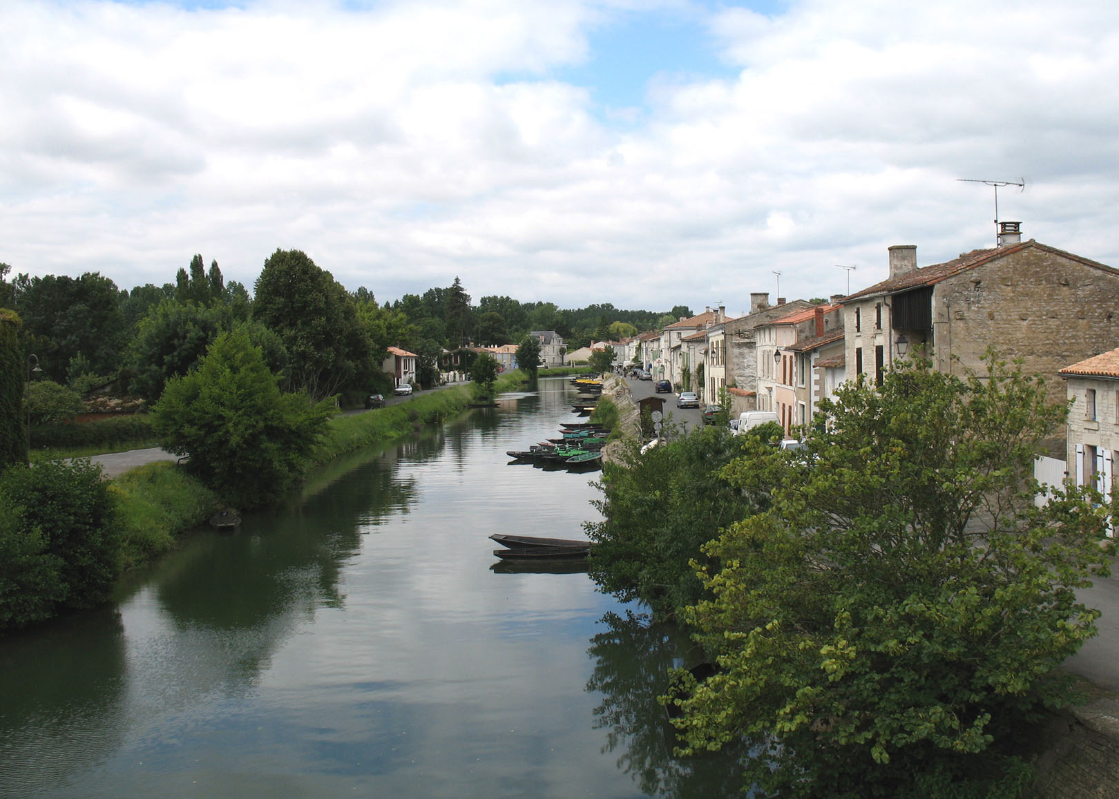 Coulon, Quai Louis Tardy, Marais poitevin, France